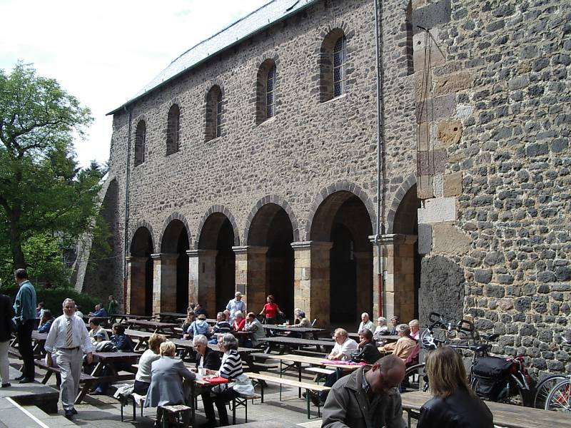 Schiffenberg, ehem. Augustiner-Chorherrenstift, Klosterkirche, Ansicht des Langhauses, von SO. Die Kirche des ehem. Augustiner-Chorherrenstift ist eine romanische Pfeilerbasilika.